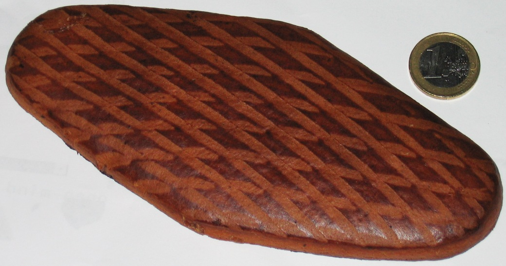 Original frankfurter Haddekuchen. Genehmigung: siehe unten